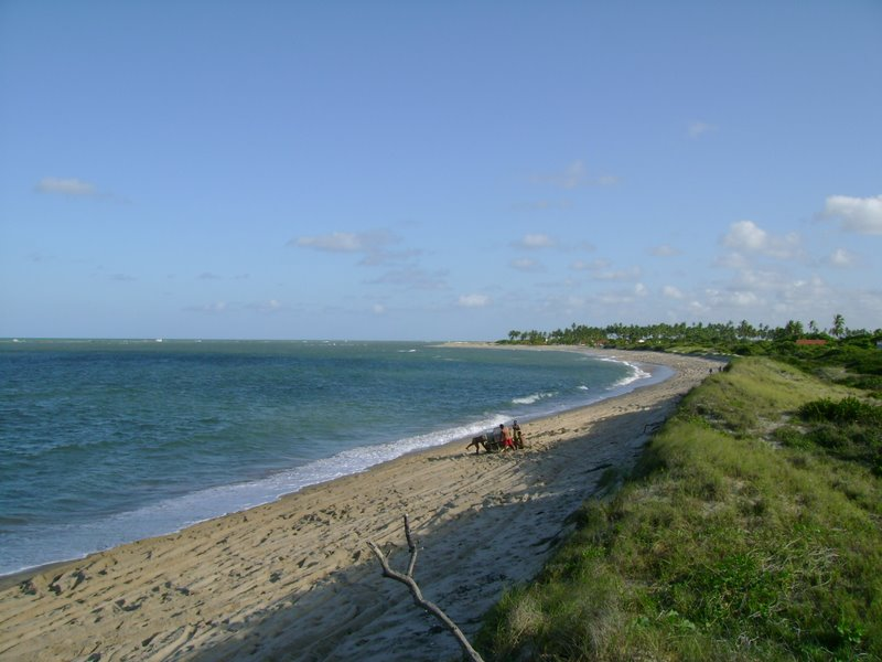 Image:praia de coqueirinho